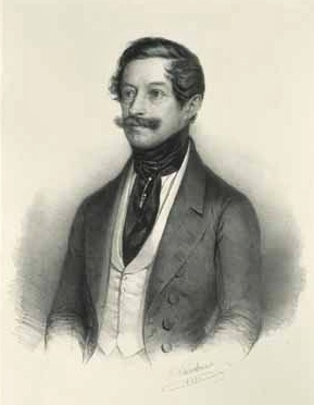 Anton von Gumppenberg (1787-1855) bayerischer General und Kriegsminister